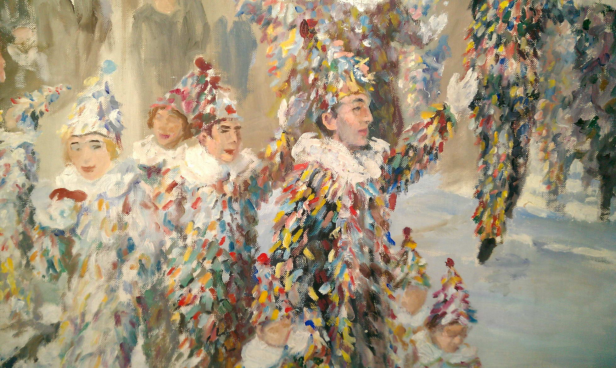 Ausschnitt aus einem Oelgemälde, das als Vorlage für das Mosaik in der Stadhalle Buchen (Odenwald) gefertigt wurde. Der Ausschnitt zeigt den damaligen Vorsitzenden der Fastnachtsgesellschaft Buchen, Herrn Kurt Hemberger.